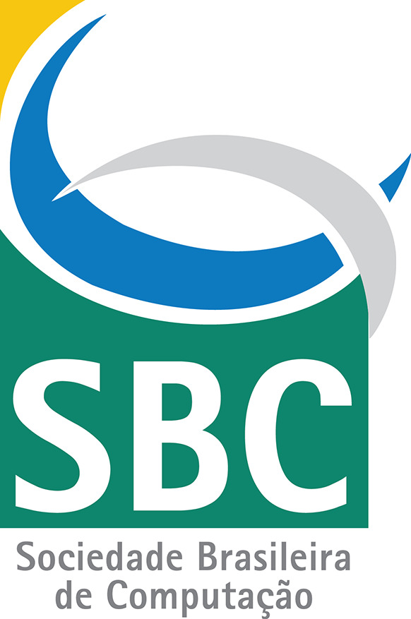 Logotipo da sociedade brasileira de computação